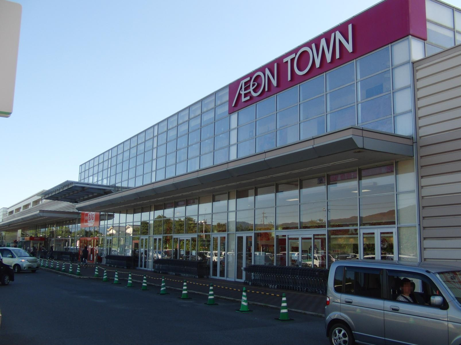 イオンタウン天理を撮影